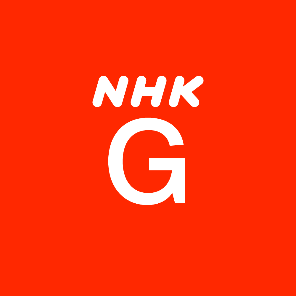 NHK総合の新ロゴマークです。